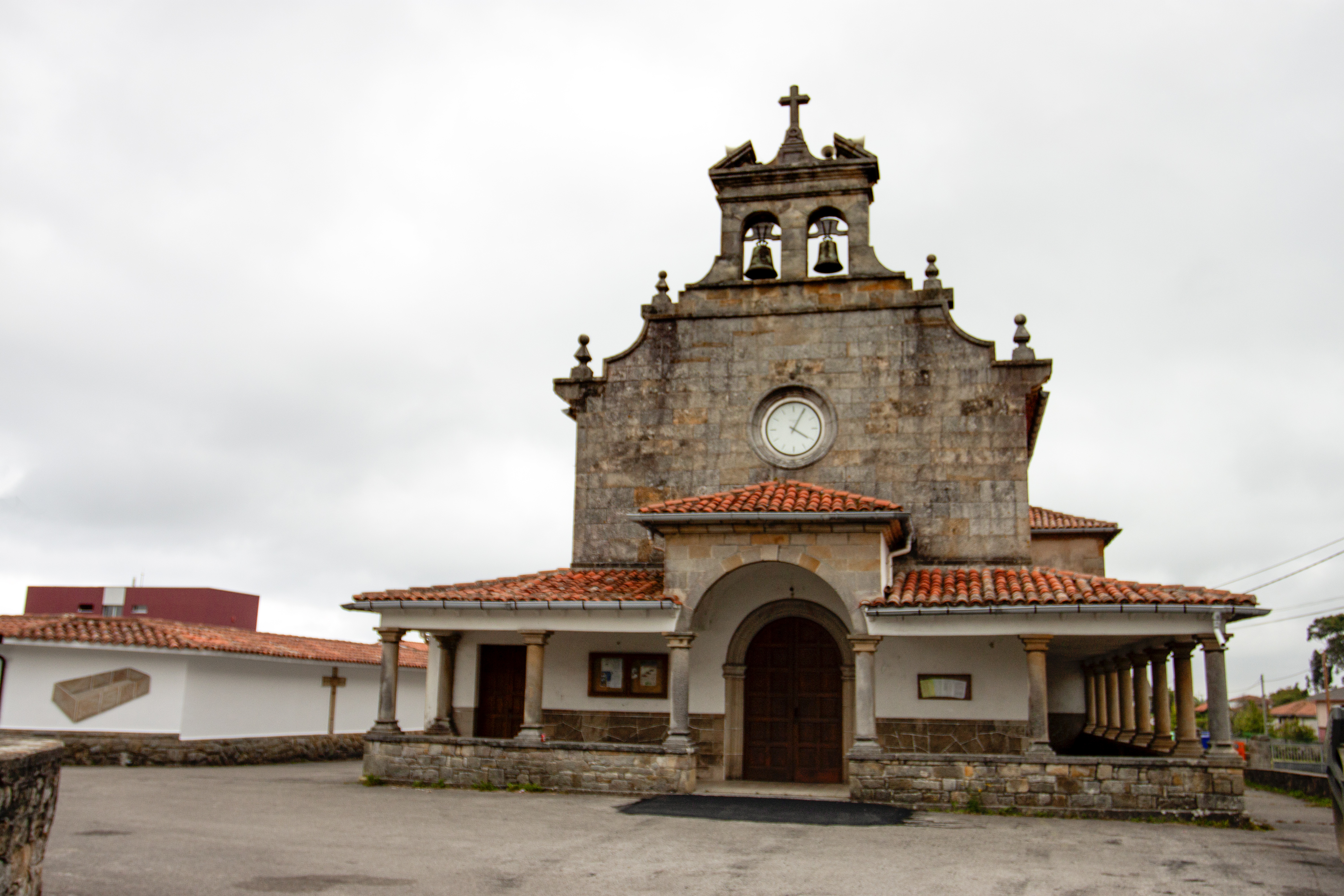 Quintes (Villaviciosa, Asturias)